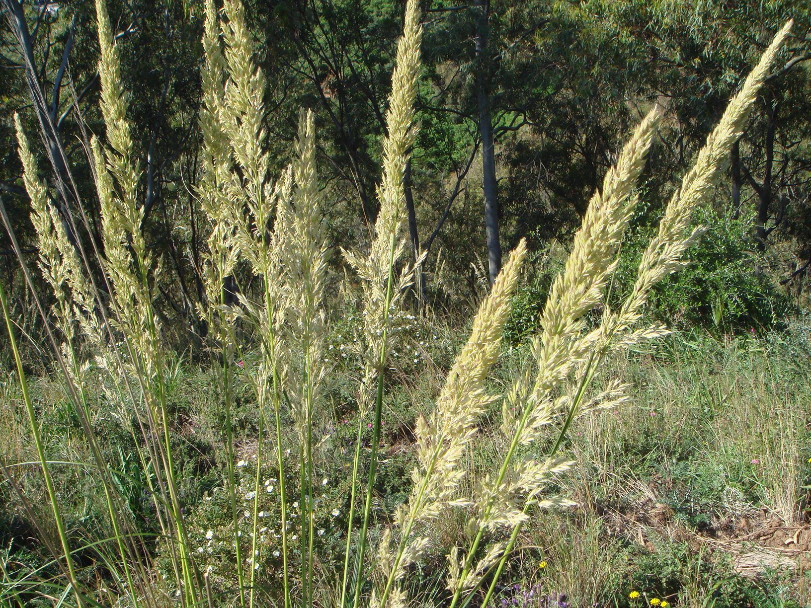 Ampelodesmos mauritanicus. Ceuta, España